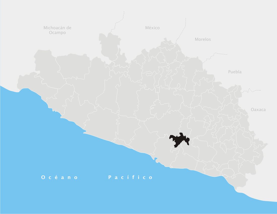 Juan R. Escudero en el estado de Guerrero (México)